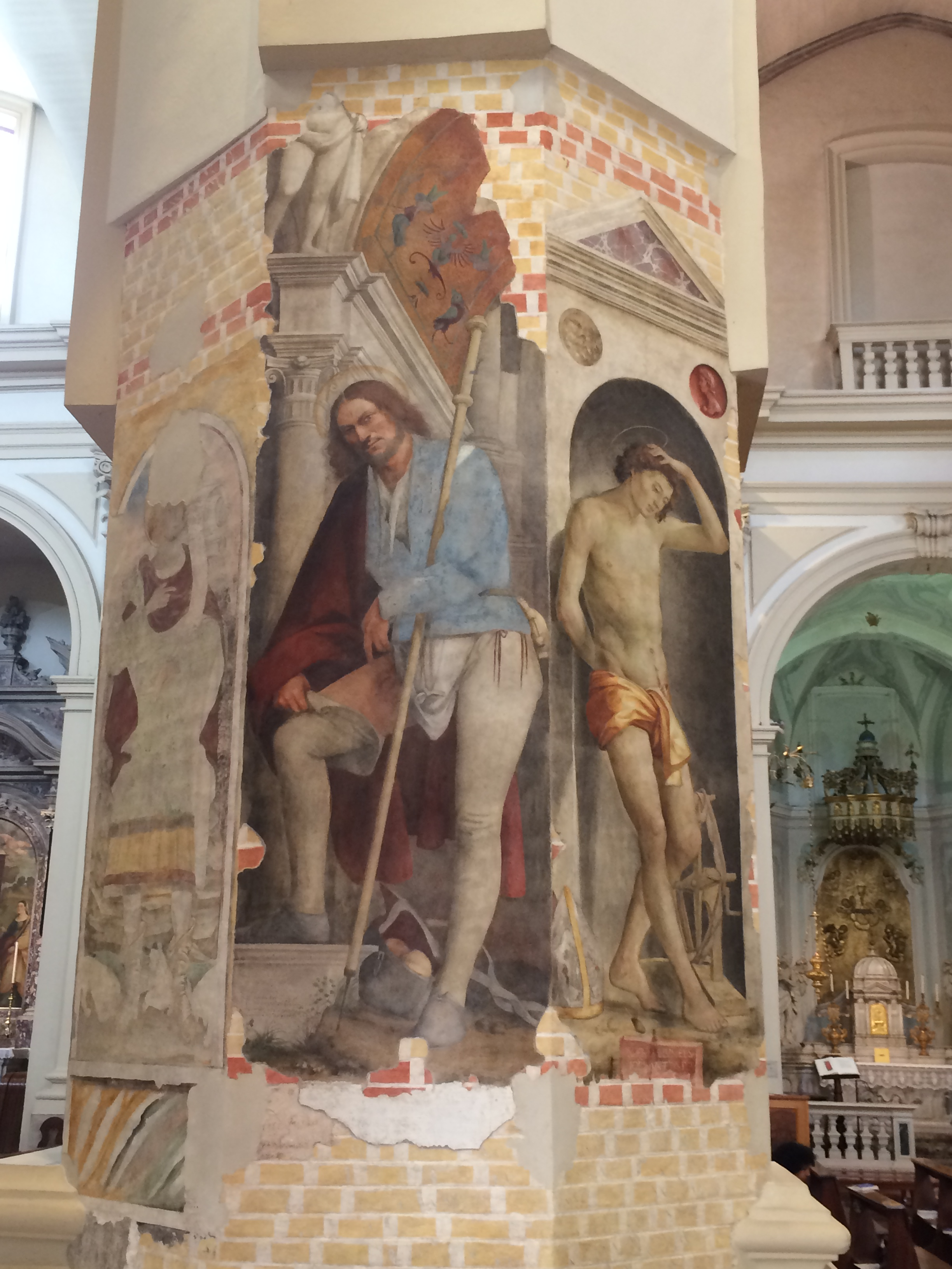 Pordenone - Duomo - Affresco su pilone di destra